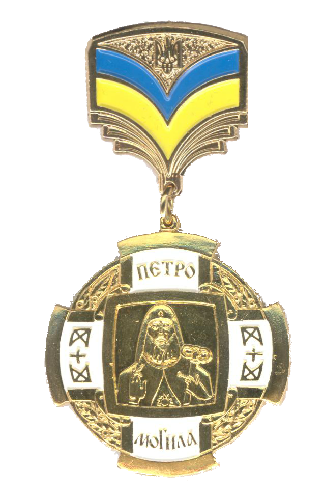 Нагрудний знак «Петро Могила» Міністерства освіти і науки України